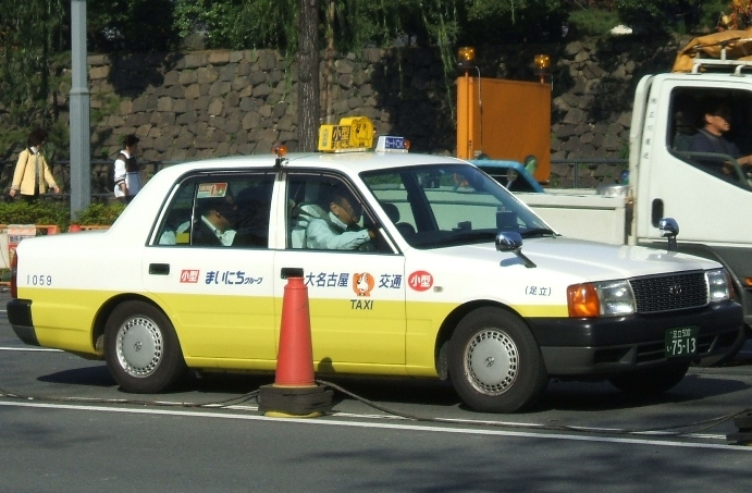 Dainagoya Kotsu taxi (in Tokyo).